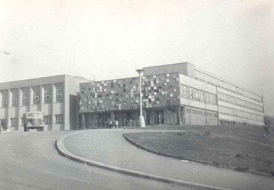 Škola ZŠ Hostýnská - historická fotografie